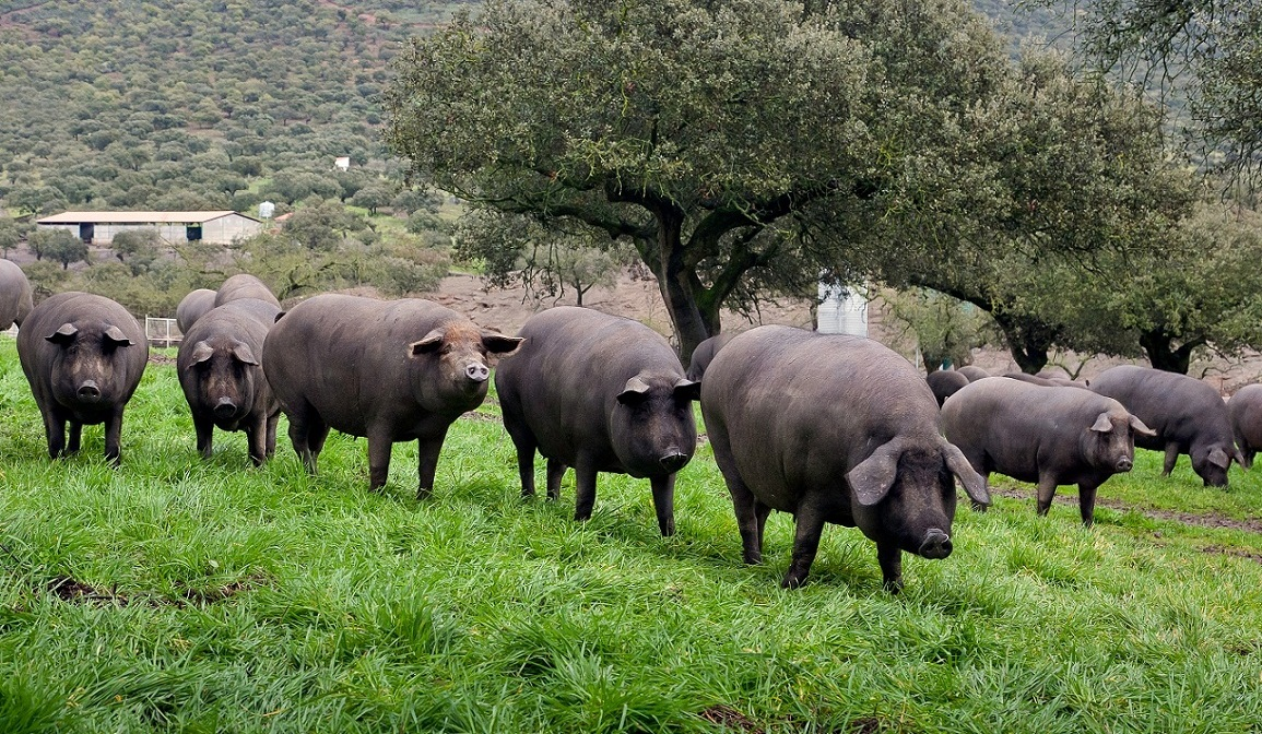 La dehesa que tiene la empresa Jamón Or en Guijuelo, Salamanca